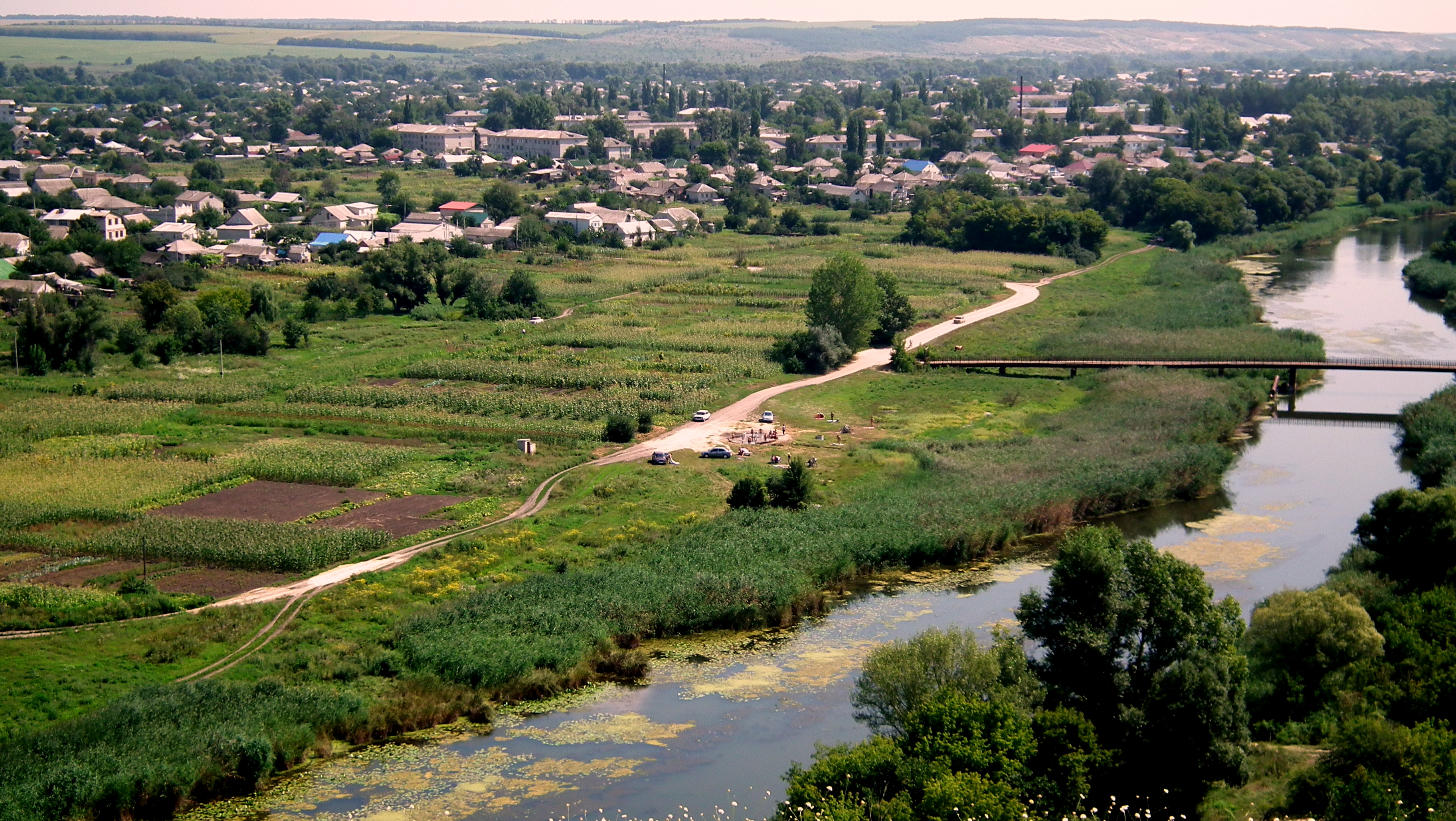 Новопсков с холма